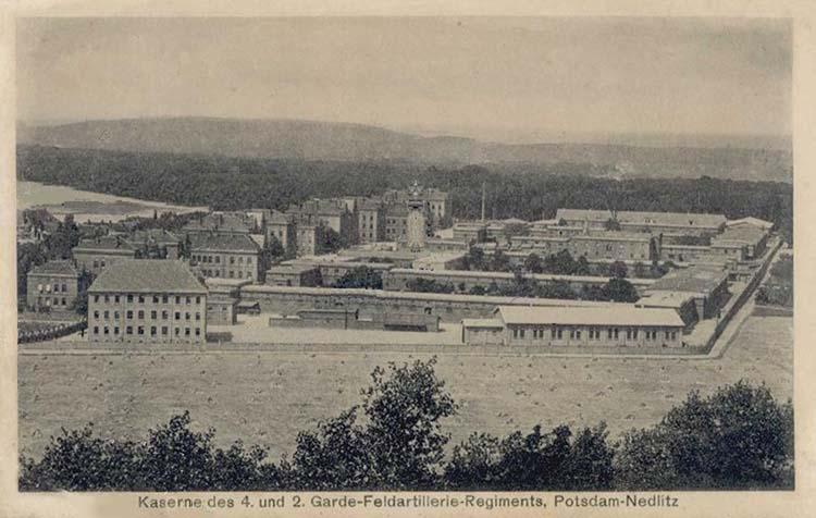 Garde-Feldartilleriekaserne in Potsdam